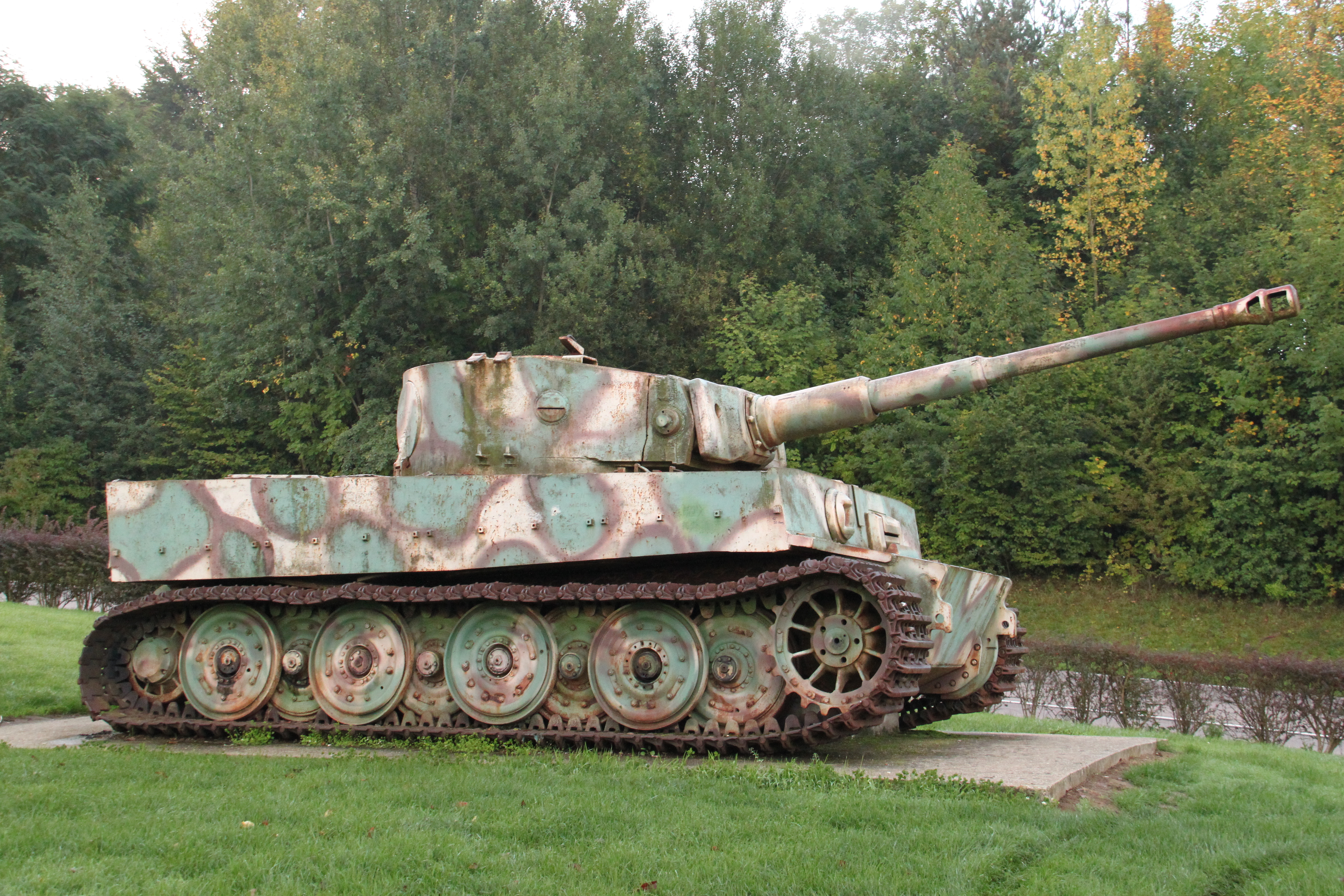 Char Tigre de Vimoutiers, un char Tigre allemand exposé route de Vimoutiers, Orne, France. Abandonné en août 1944 lors de la fermeture de la poche de Chambois (bataille de Normandie), il fut restauré dans les années 1970. Il a été classé au titre d'objet, monument historique en 1975. C'est l'un des deux seuls exemplaires subsistant en France (le second est au musée des blindés de Saumur.